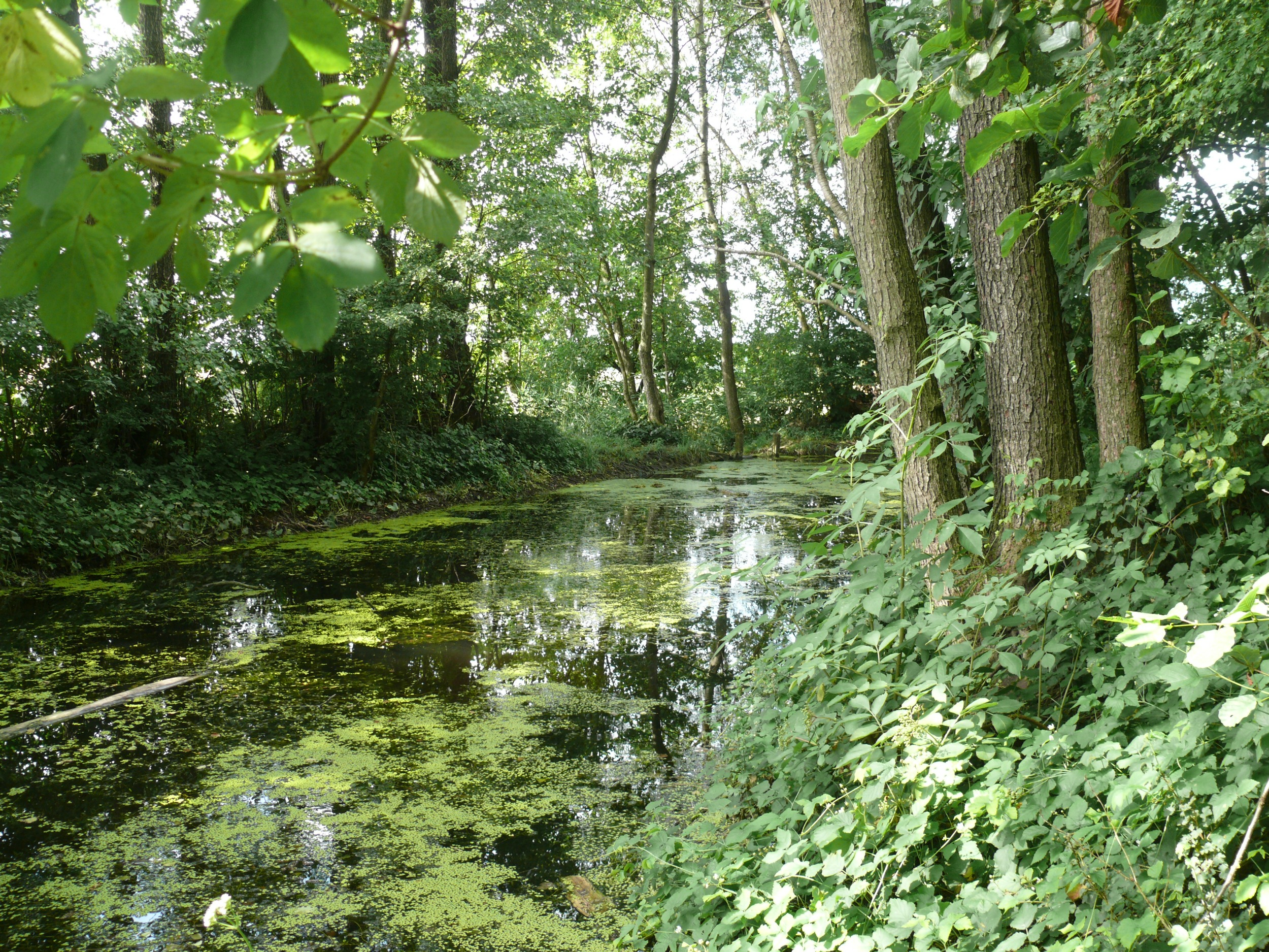 Wassergefüllter Graben, Flyhöhe bei Blaufelden